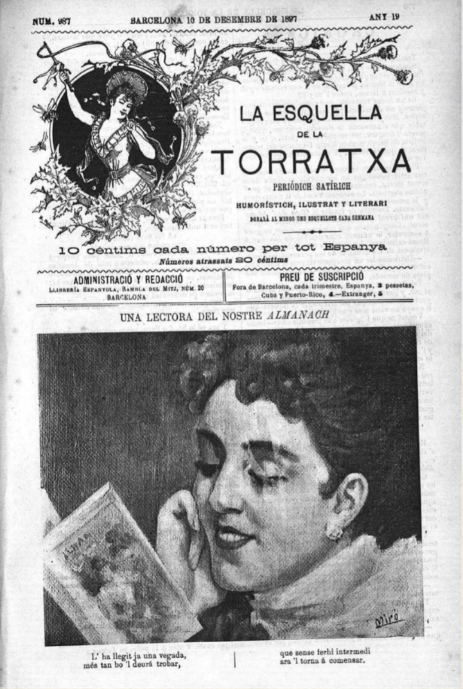 Cap de Brot a la revista de La Esquella de la Torratxa